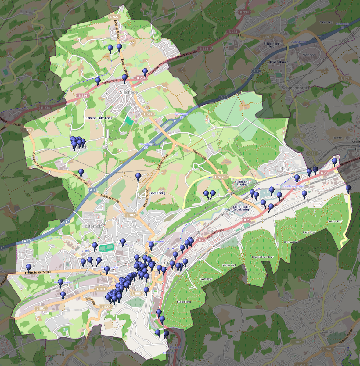 Karte der Lage aller Baudenkmäler in Gevelsberg, Stand Februar 2013